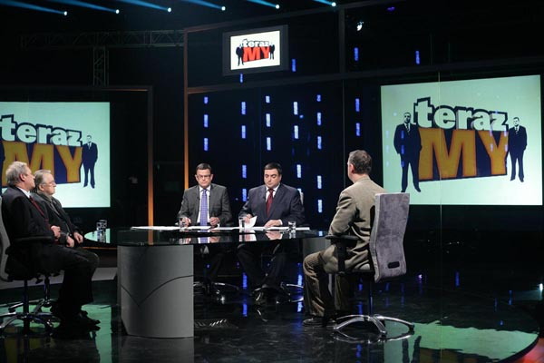 Program telewizyjny Teraz my!